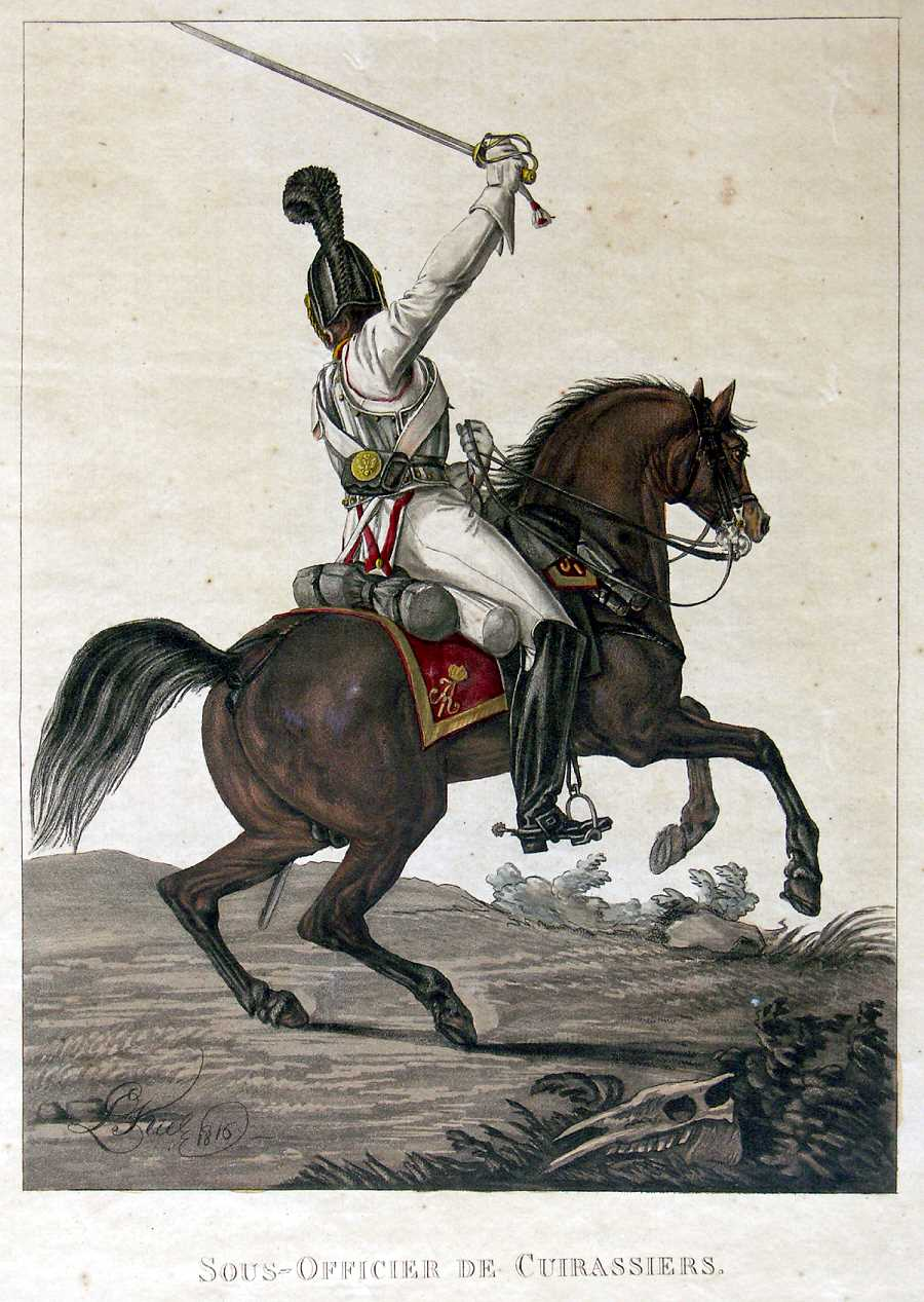 Унтер-офицер Кирасирских полков. (Псковского)